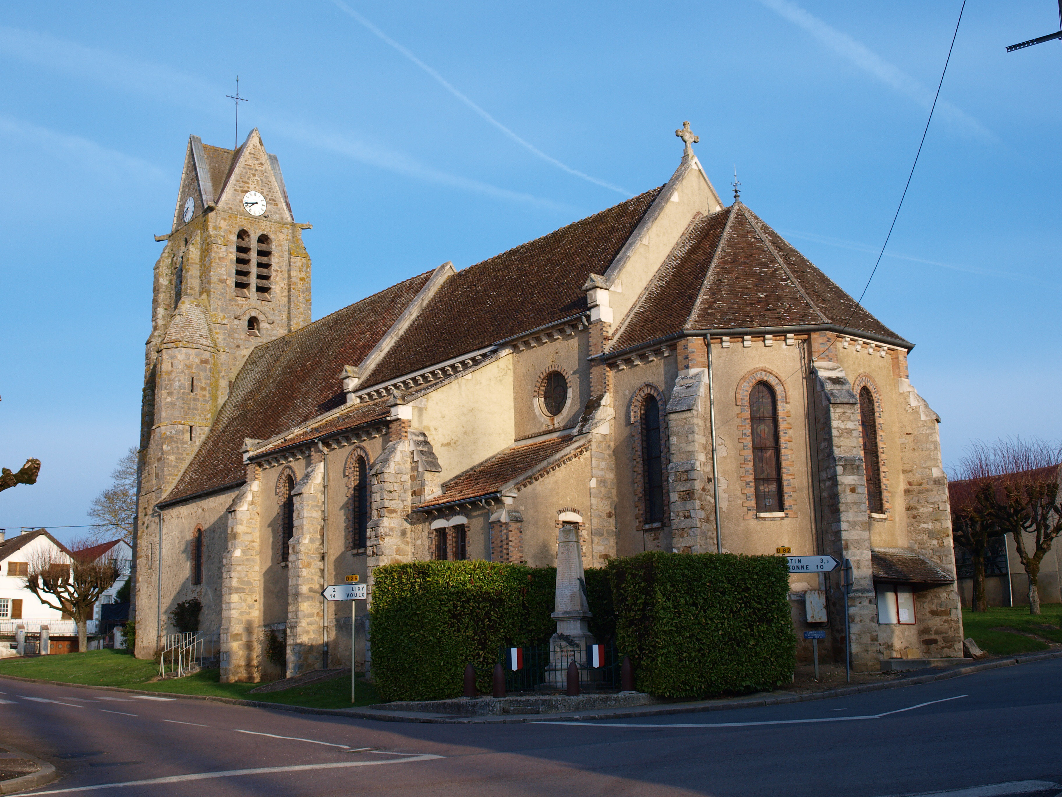 Brannay (Yonne, France) ; église